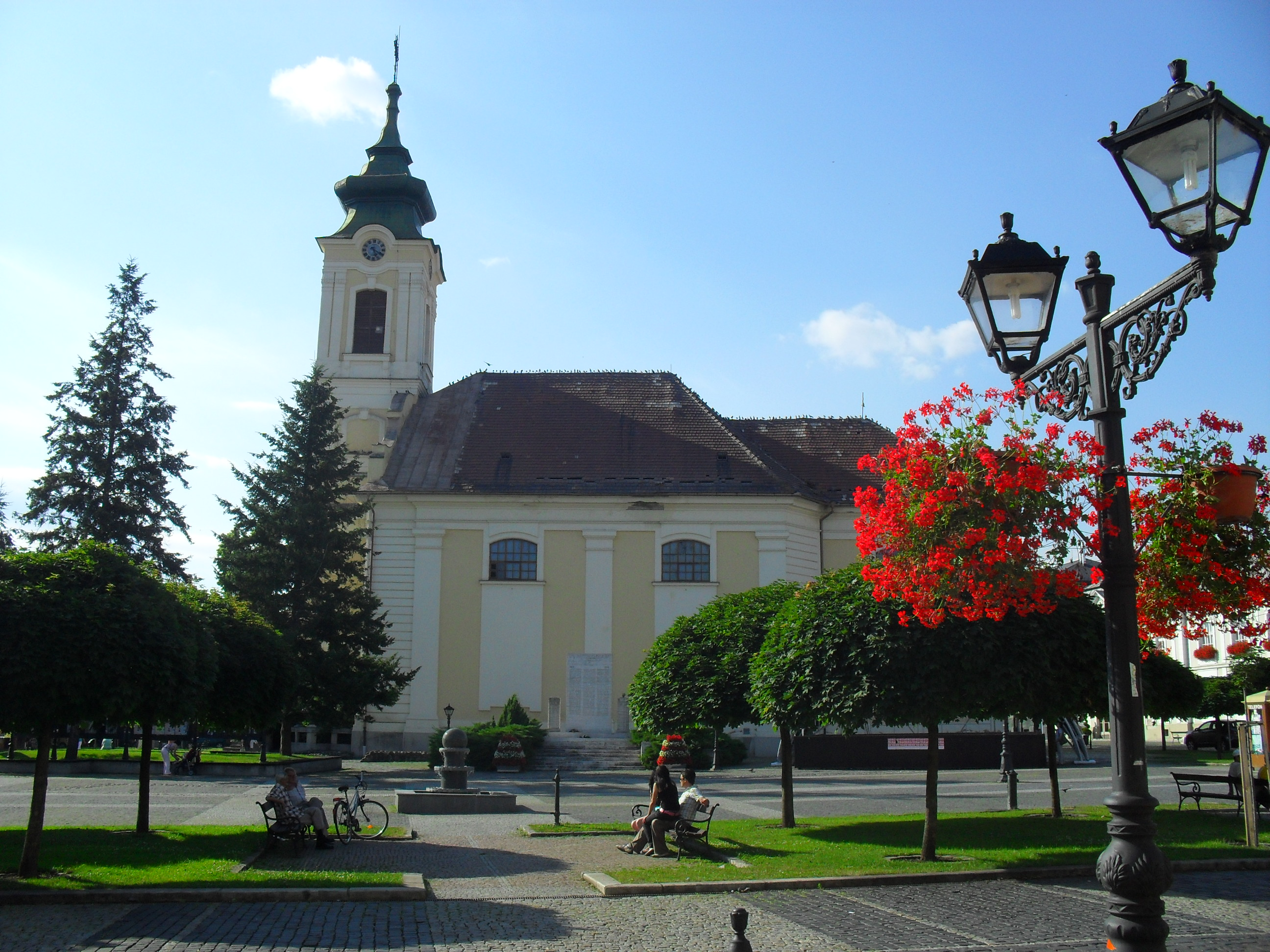 Rimaszombat - a katolikus templom a főtéren